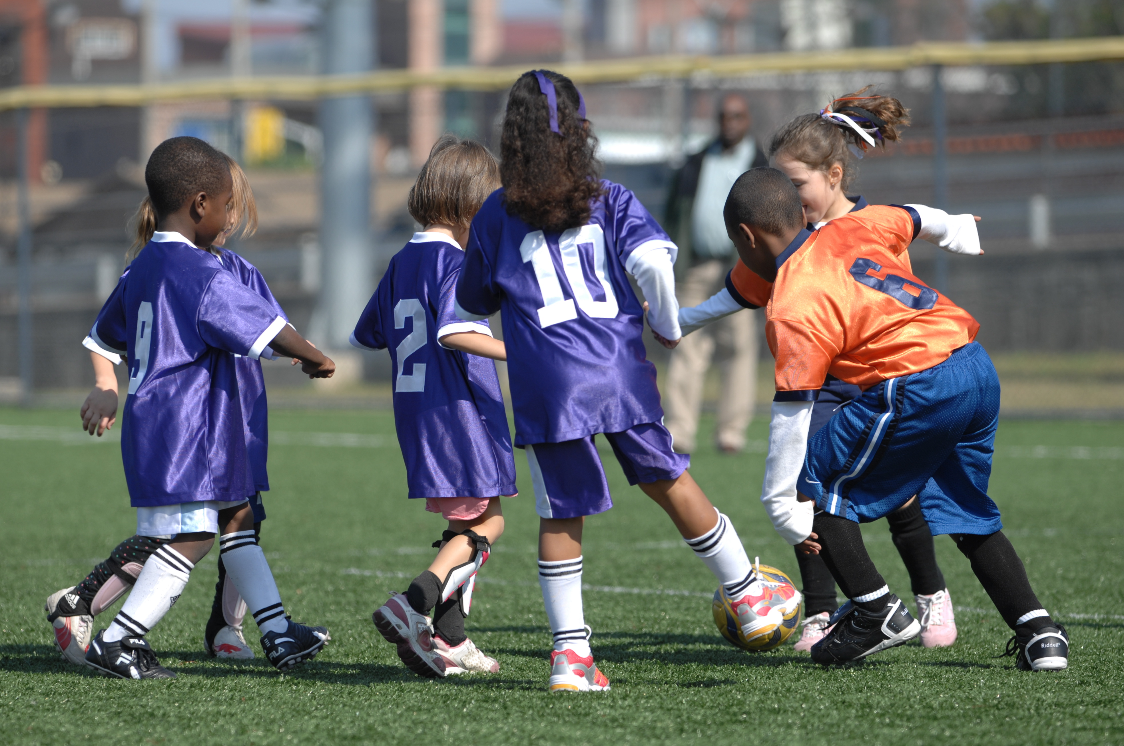 Zdjęcie przedstawiające grupę dzieci uprawiających sport (np. karate, piłka nożna, siatkówka, koszykówka) (ujęcie wykonane w sposób uniemożliwiający rozpoznanie twarzy) English | Polski | +/−